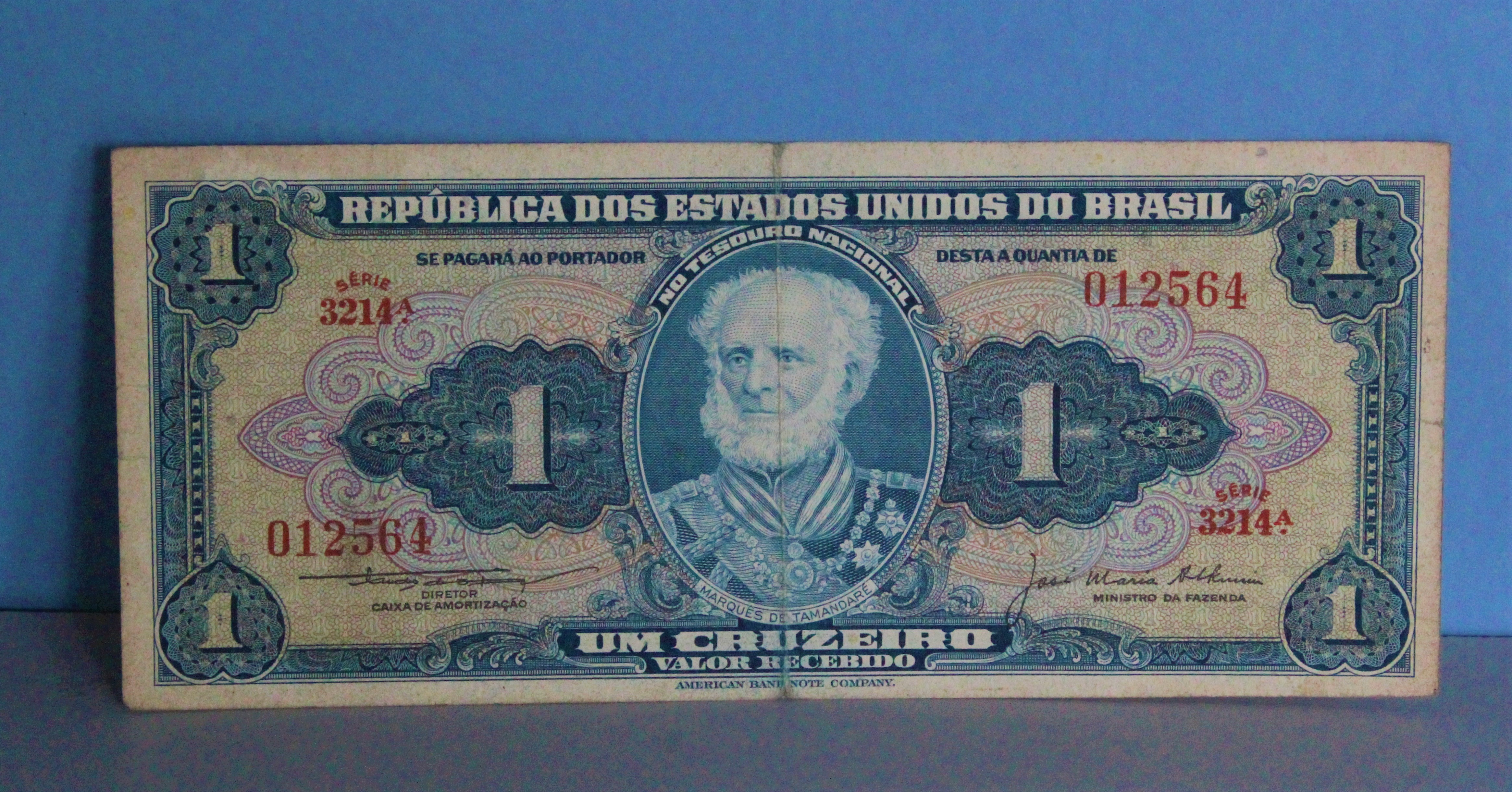 Cédula de 1 Cruzeiro de 1942 com a efígie do Almirante Tamandaré, patrono da marinha do Brasil.